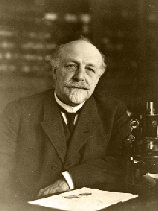 Albert Auguste Toussaint Brachet (1869-1930) est un médecin belge qui a hissé le renom de l'École belge d'embryologie au niveau mondial